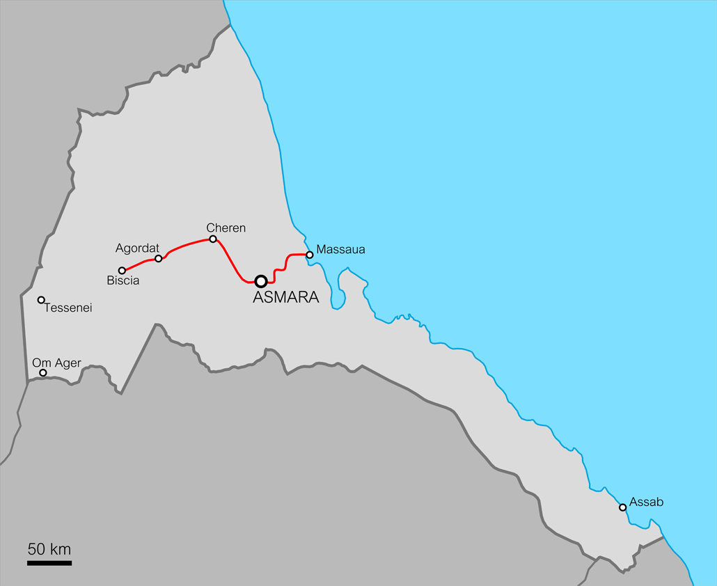 La rete ferroviaria dell'Eritrea Italiana